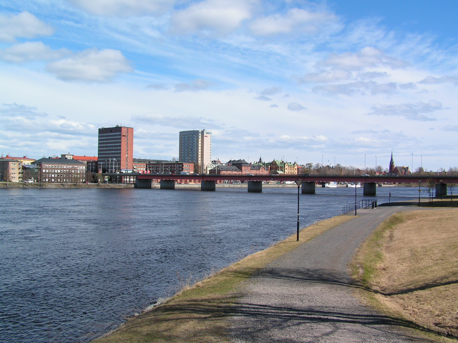 Tegsbron (Teg bridge, Umeå)